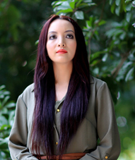 Linh Nga tại chùa Hoàng Ân (Hà nội, Việt nam) trong một cuộc phỏng vấn, chụp ảnh năm 2017.